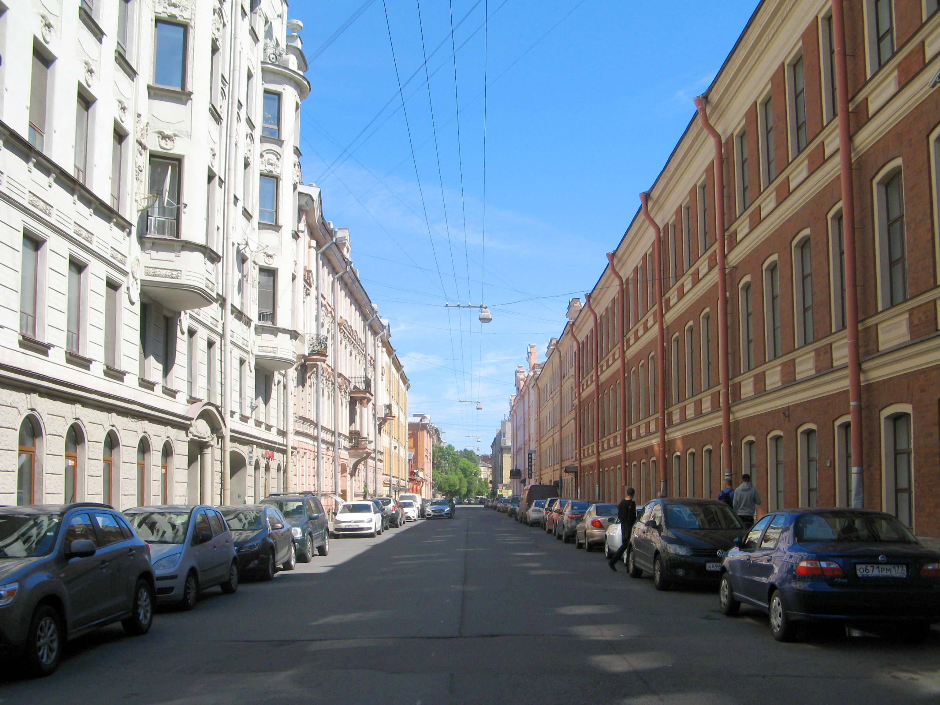 Зверинская улица, Санкт Петербург